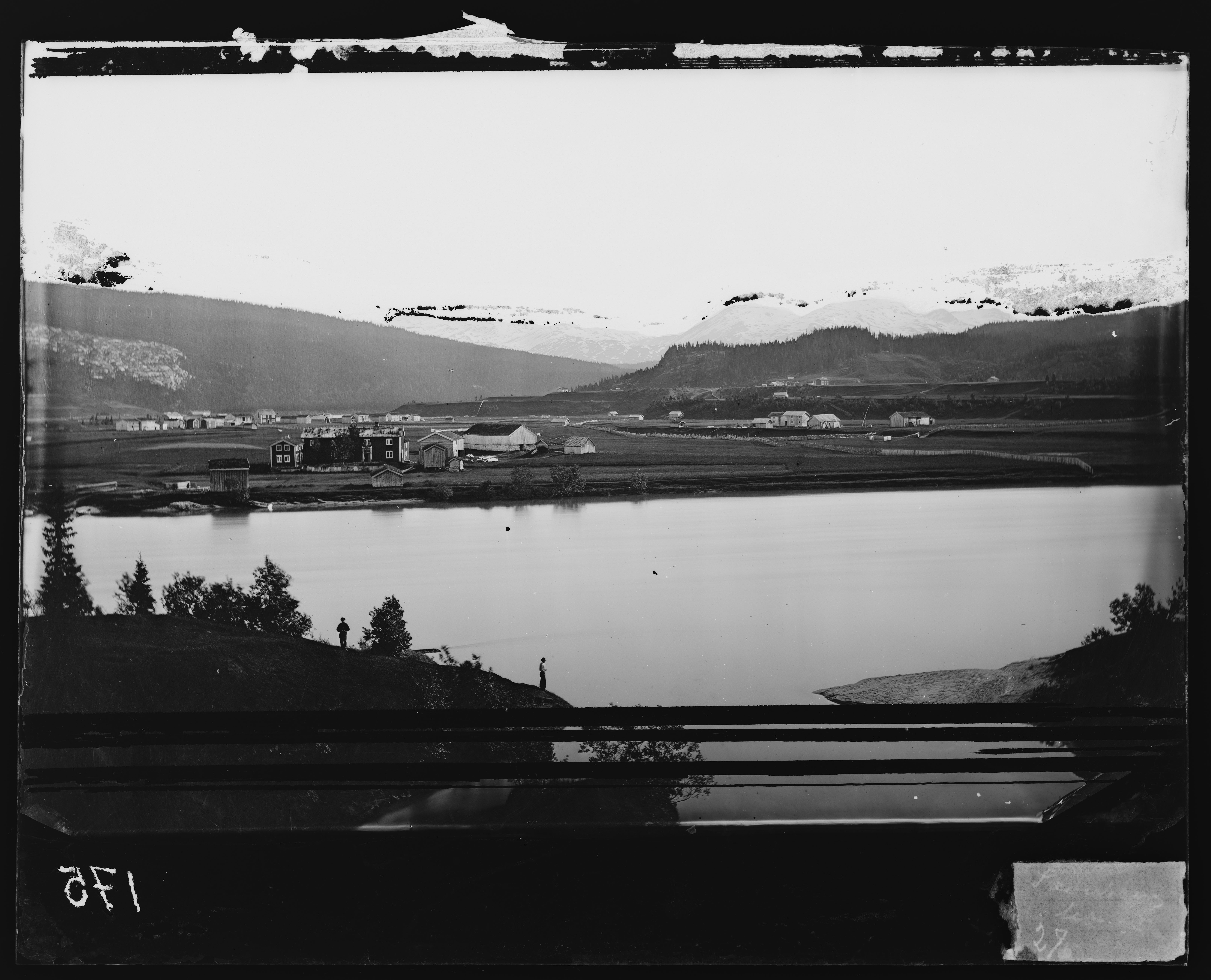 Tittel / Title: Skonseng. 1870. Beskrivelse / Description: Dato / Date: 1870 Sted / Place: Nordland, Rana, Skonseng, Thomassengården, Rødvandgården, Bakkengården, Kvernhusheia Fotograf / Photographer: Ole Tobias Olsen (1830-1924) Bildesignatur / Image Number: bldsa_OTO0175_A Digital kopi av original / Digital copy of original: negativ s/h glass, ca 13 x 17 cm Eier / Owner Institution: Nasjonalbiblioteket / National Library of Norway Lenke / Link